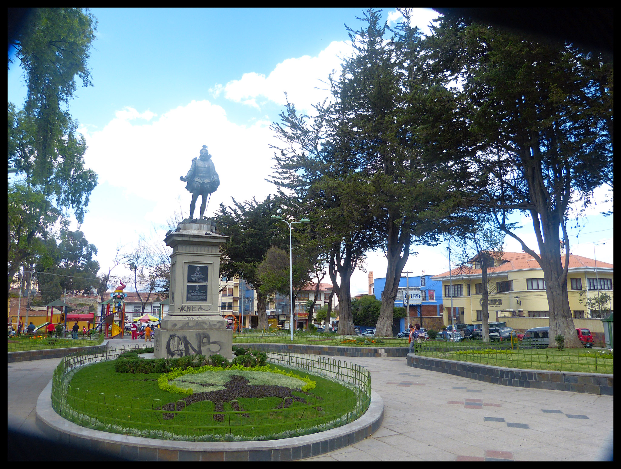 Miguel de Cervantes y Saavedra This medium shows the protected monument with the number L/00-255 in Bolivia.